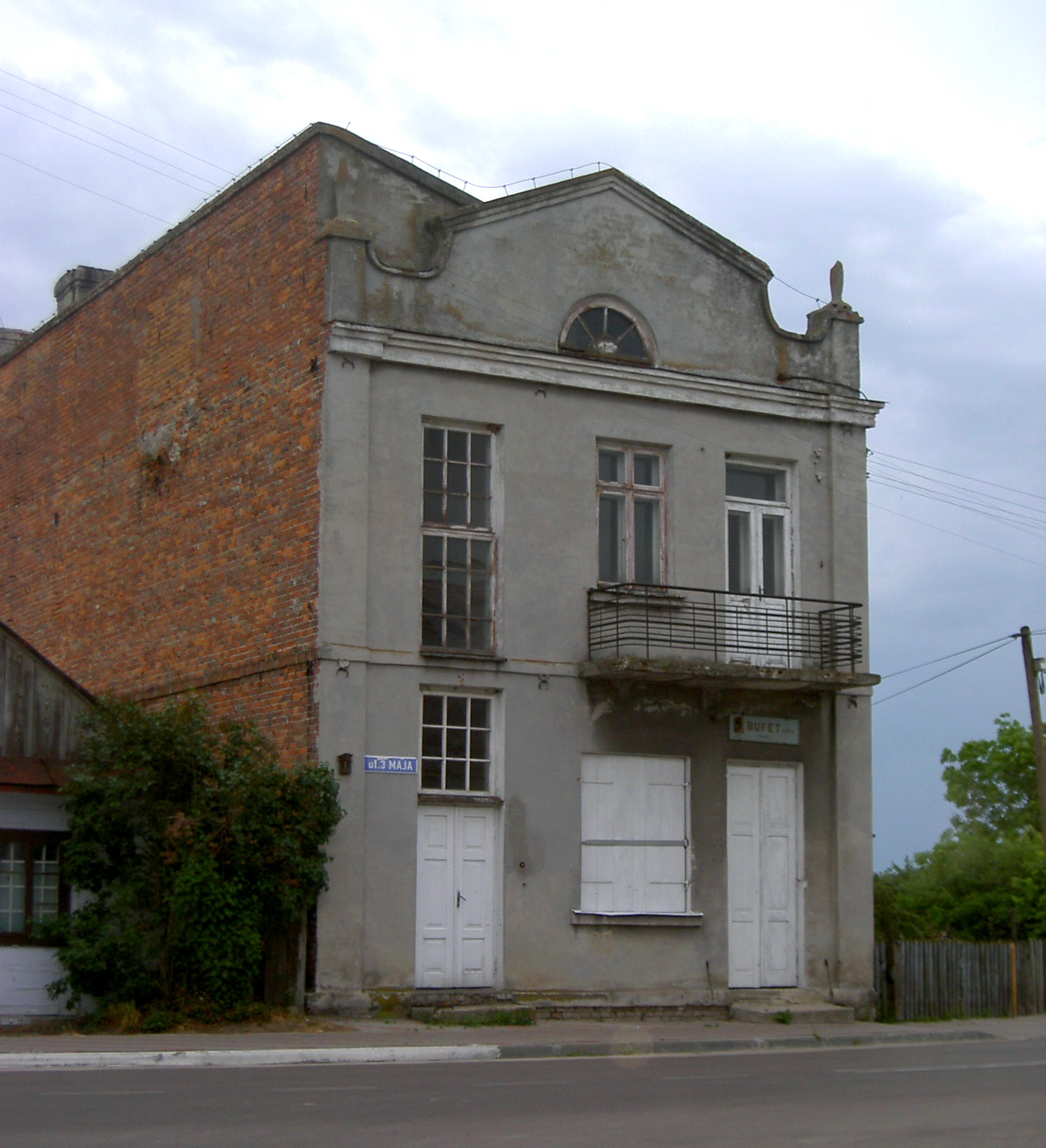 Tyszowce, Poland • Kamienica / Town house